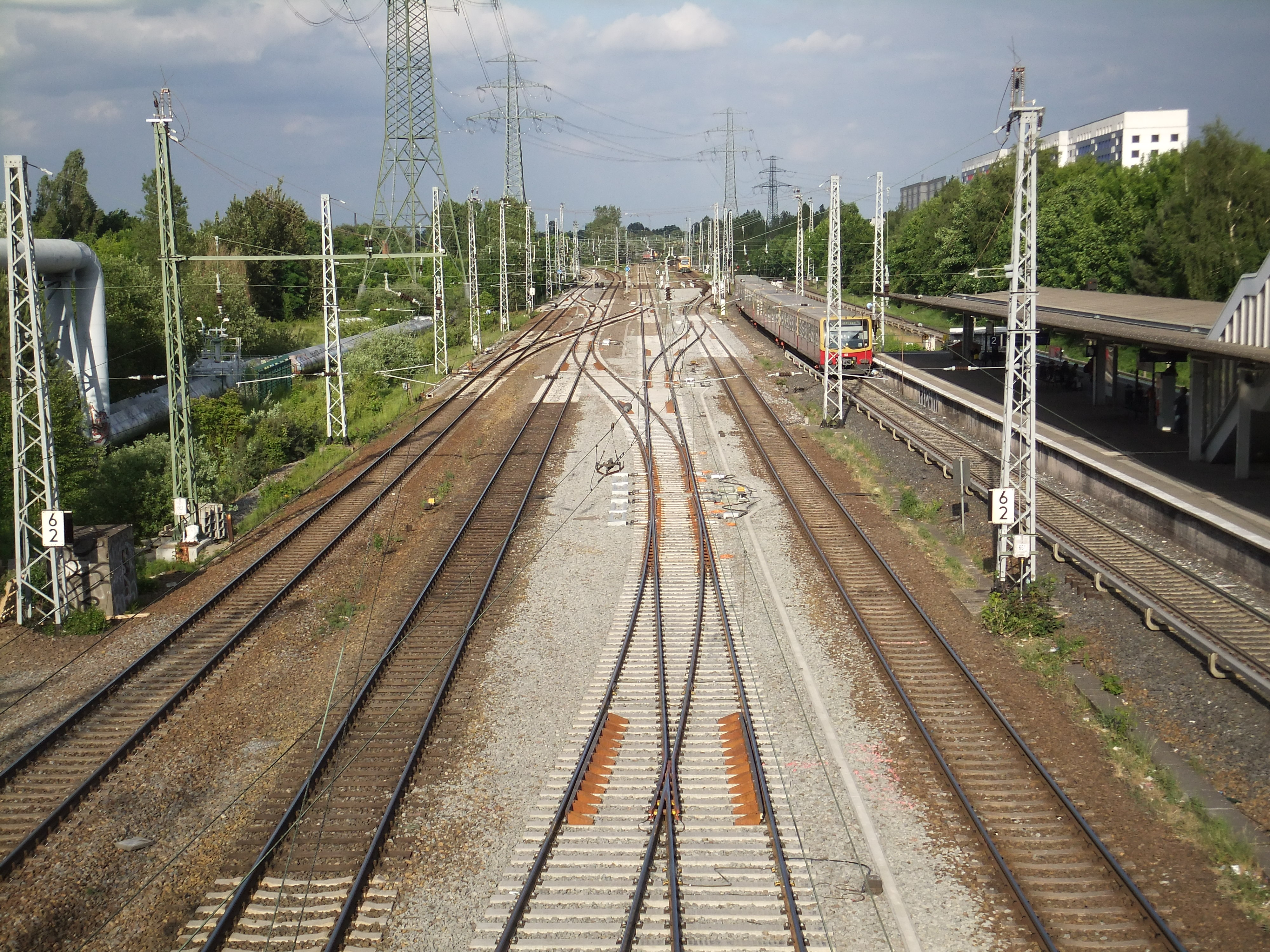 Die Gleisanlagen der Abzweigstelle Berlin Biesdorfer Kreuz West. Rechts daneben befindet sich der Haltepunkt Berlin Friedrichsfelde Ost. 220-kV-Freileitung.